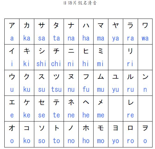 片假名清音一覽 源自列出的網站。